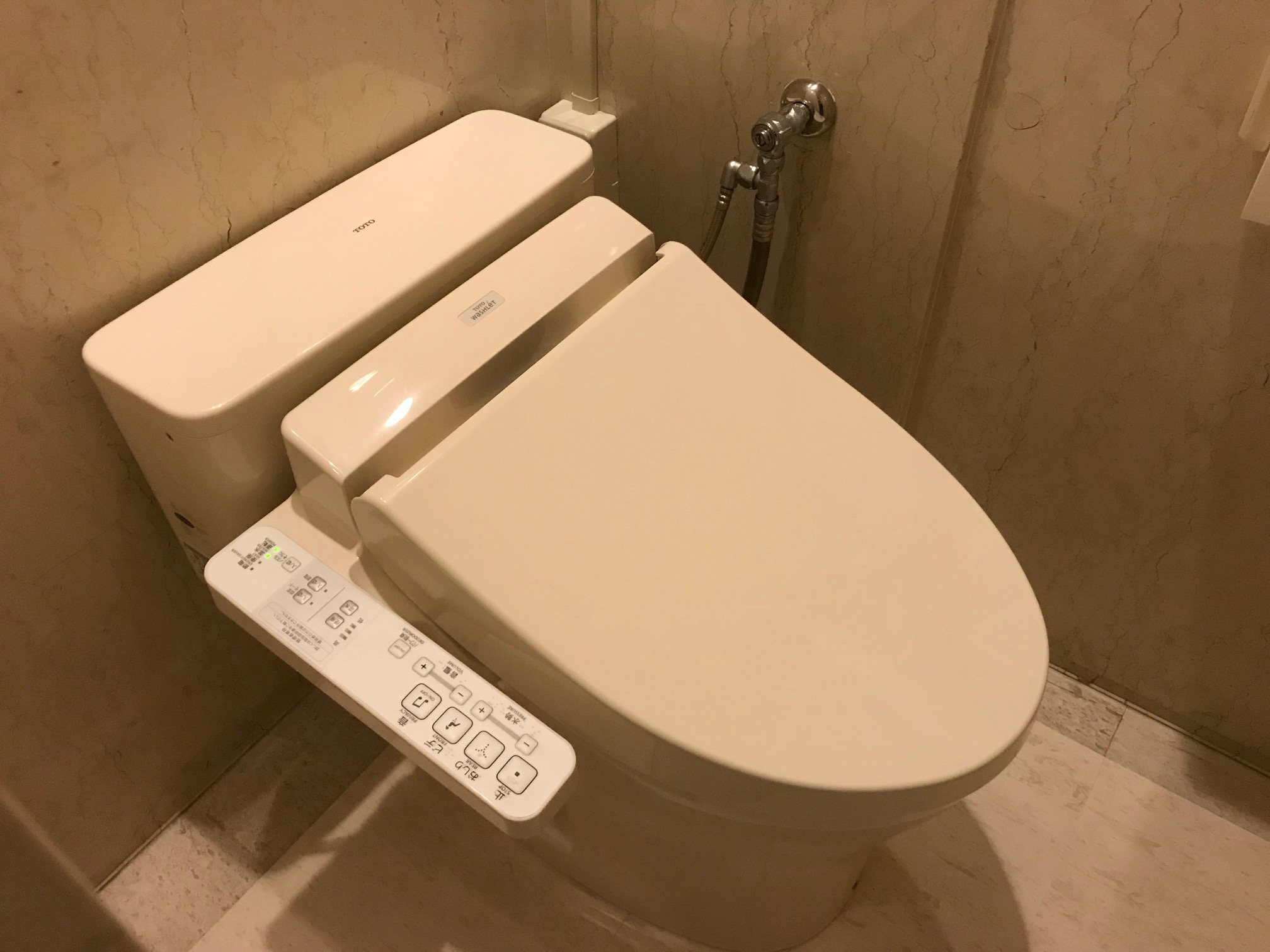 パブリック向けコンパクト便器。フラッシュバルブ式と同等の洗浄間隔を一般の水道配管15Aサイズで実現したもの。